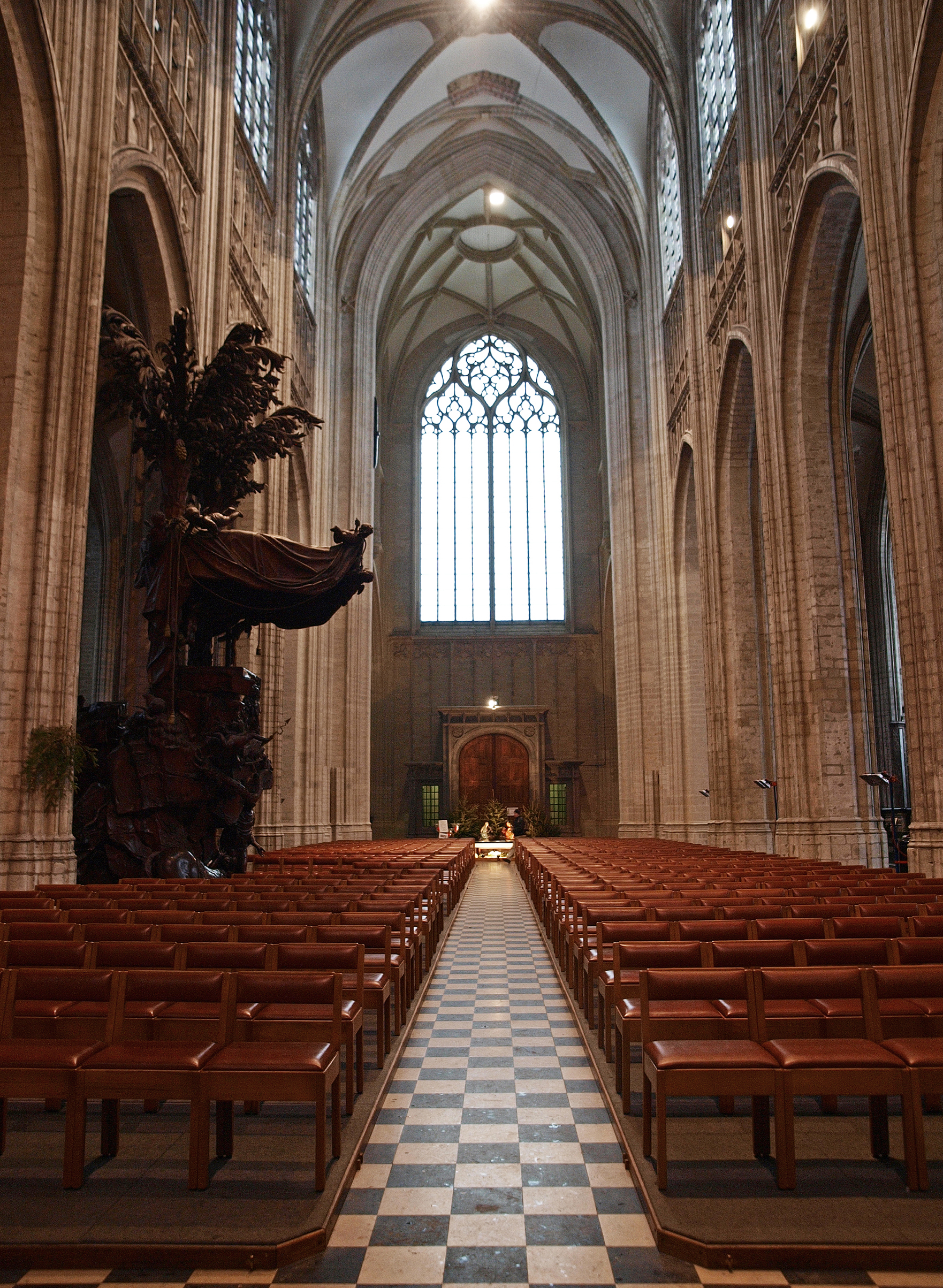 december 2010. leuven, belgium